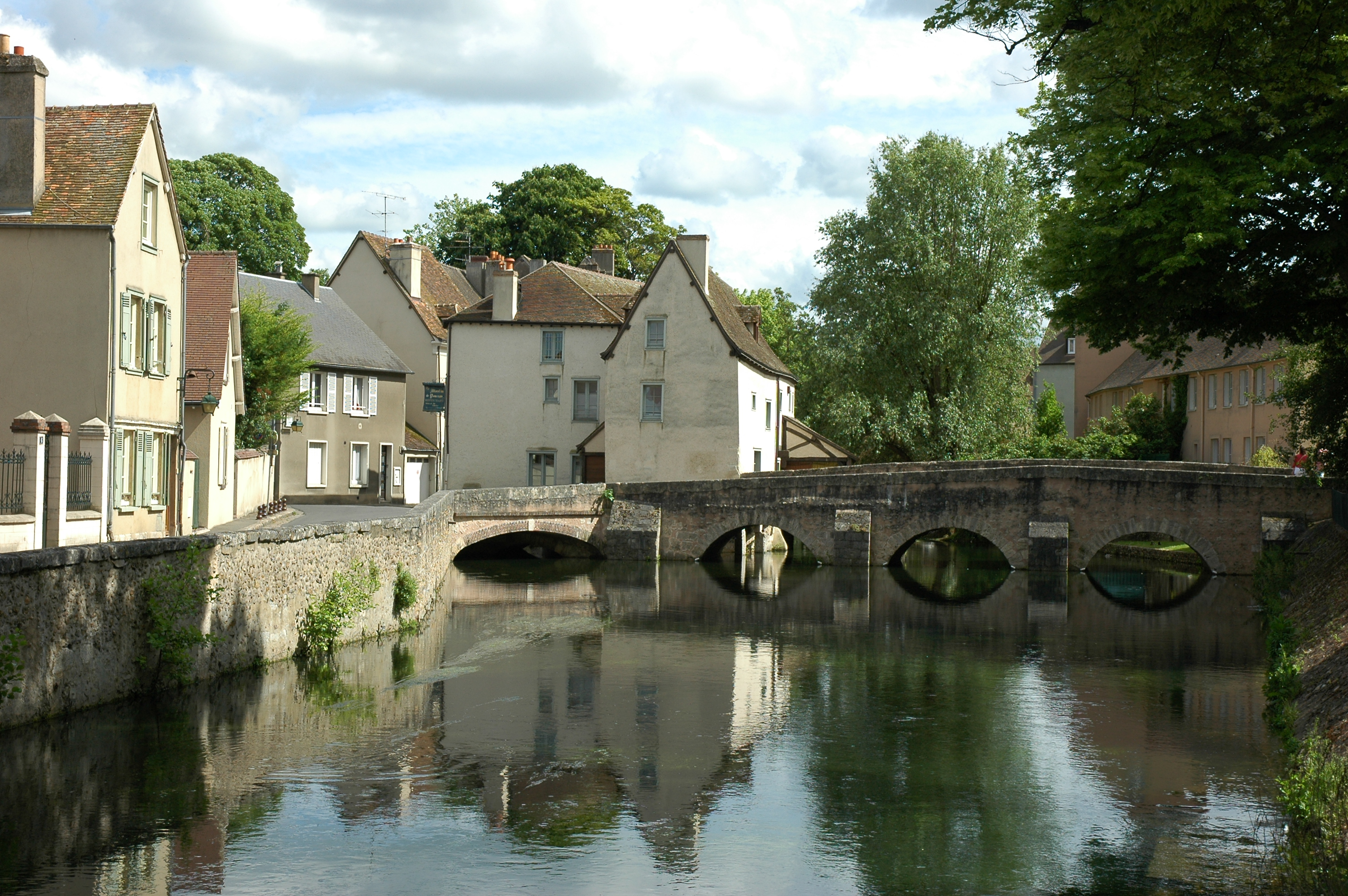 Le pont des Minimes, le moulin de Ponceau et les bords de l'Eure, Chartres, Eure-et-Loir (France). Photographie prise par GIRAUD Patrick.